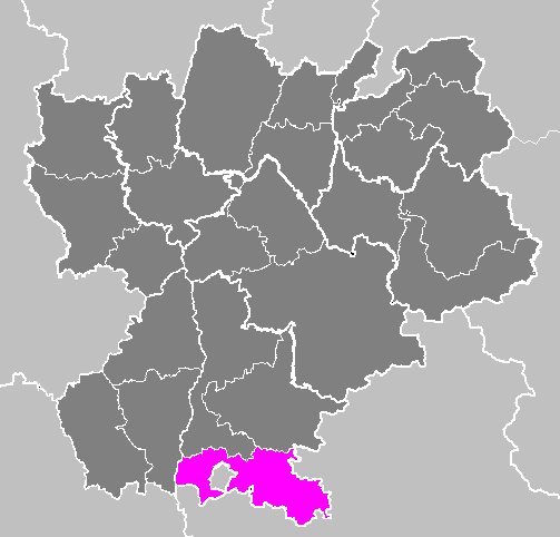 Maps of arrondissements and cantons of France: Arrondissement de Nyons.PNG (Région Rhône-Alpes)